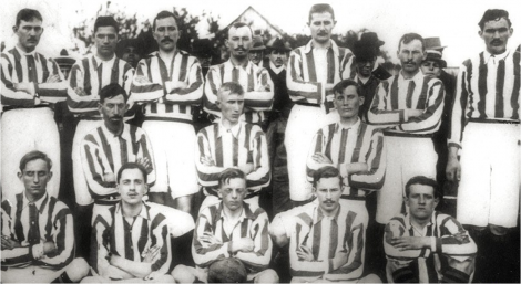 time do Coritiba Foot Ball Club na sua primeira partida oficial em 23 de outubro de 1909